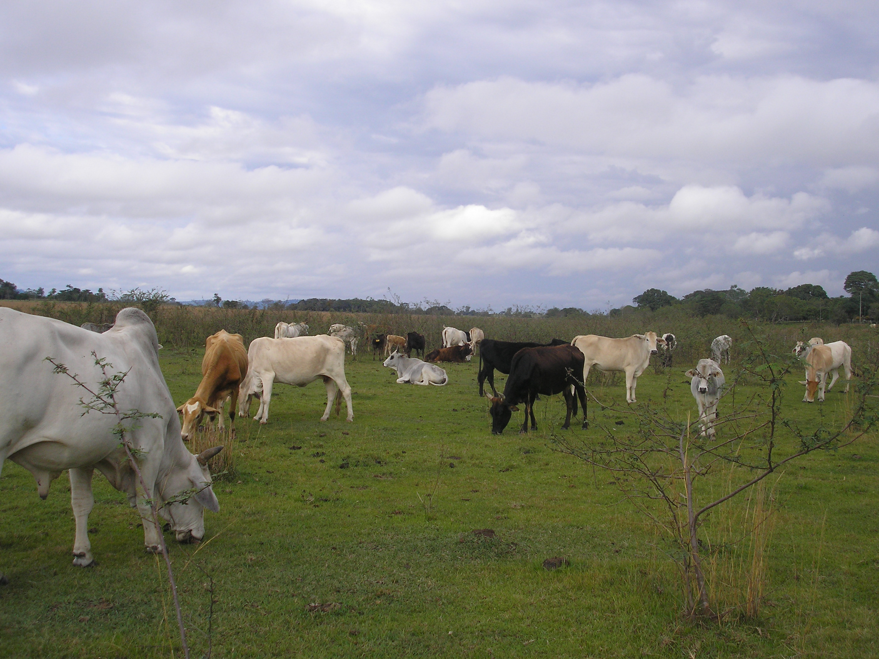 La producción ganadera bovina es muy abundante en la zona de Veinticinco de Diciembre, con una aglomeración de por lo menos 40.000 Cabezas.